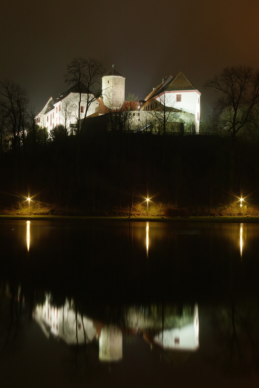 Schloß Iburg Nachtaufnahme